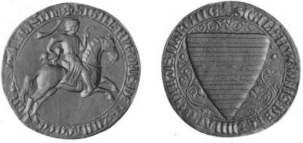 Zegel van Hugo X van Lusignan, echtgenoot van Isabella van Angoulême. Zegel: + SIGILL : HVGONIS : DE : LEZINIACO : COMITIS : ENGOLISME; contra- of tegenzegel: + SIGILL : HVGONIS : DE : LEZINIACO : COMITIS : MARCHIE